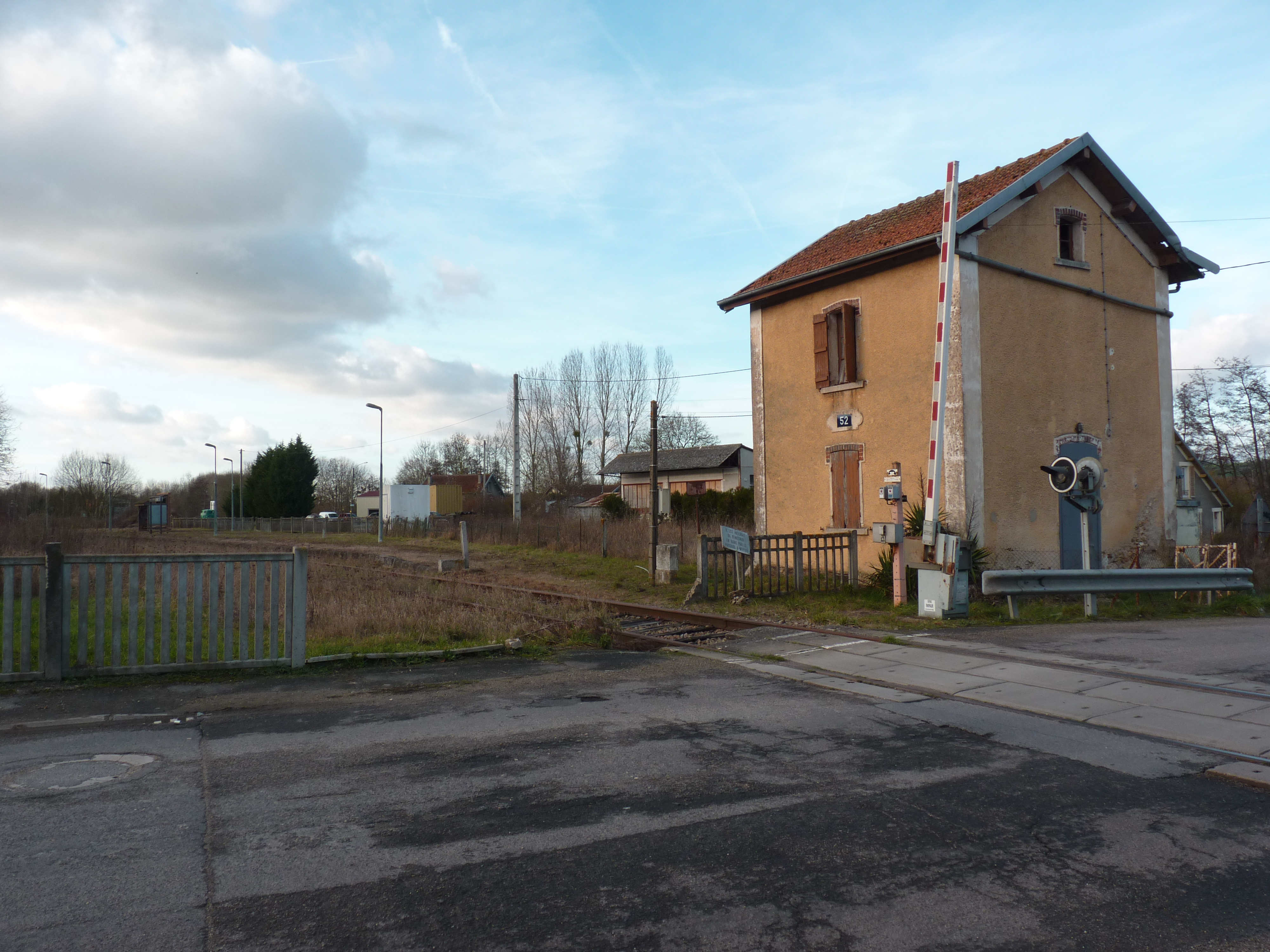 L'ancienne gare de Saint-Siméon sur la ligne de Gretz-Armainvilliers à Sézanne.